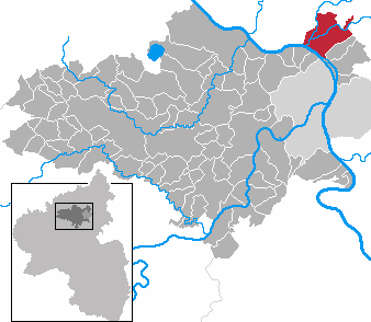 Bendorf in Rhineland-Palatinate - district Mayen-Koblenz